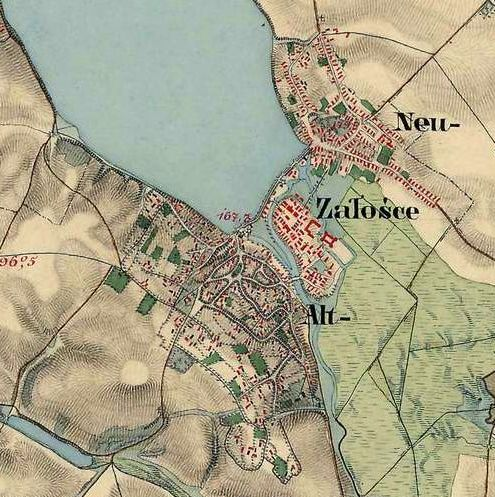 Załosce am Seret, Josephinische Landesaufnahme 1869